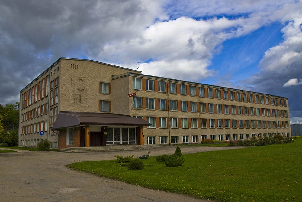 Malnavas koledžas jaunais korpuss atklāts 1971.gadā.